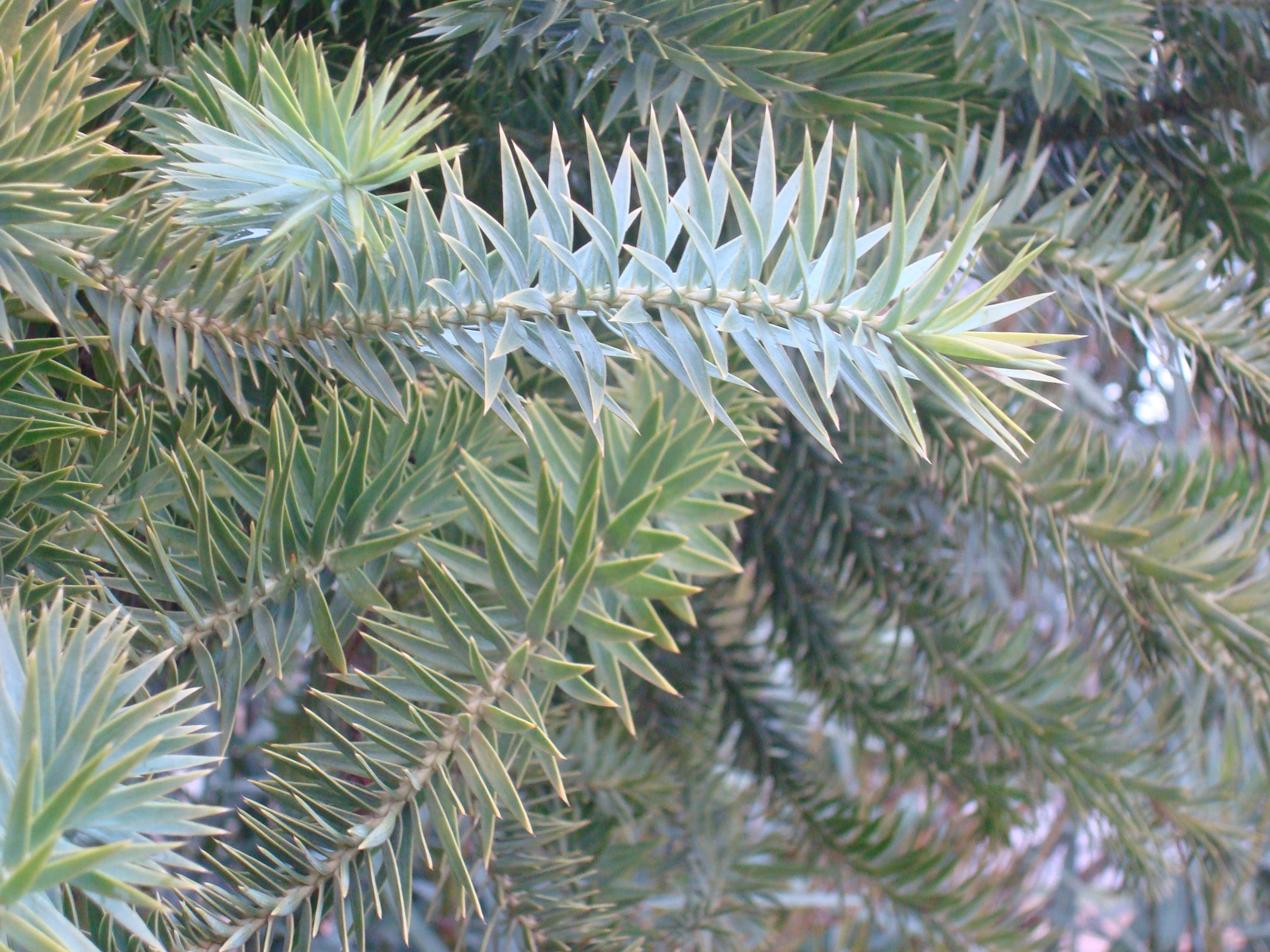 Araucaria angustifolia's leaves, Parc de la Tête d'Or, Lyon